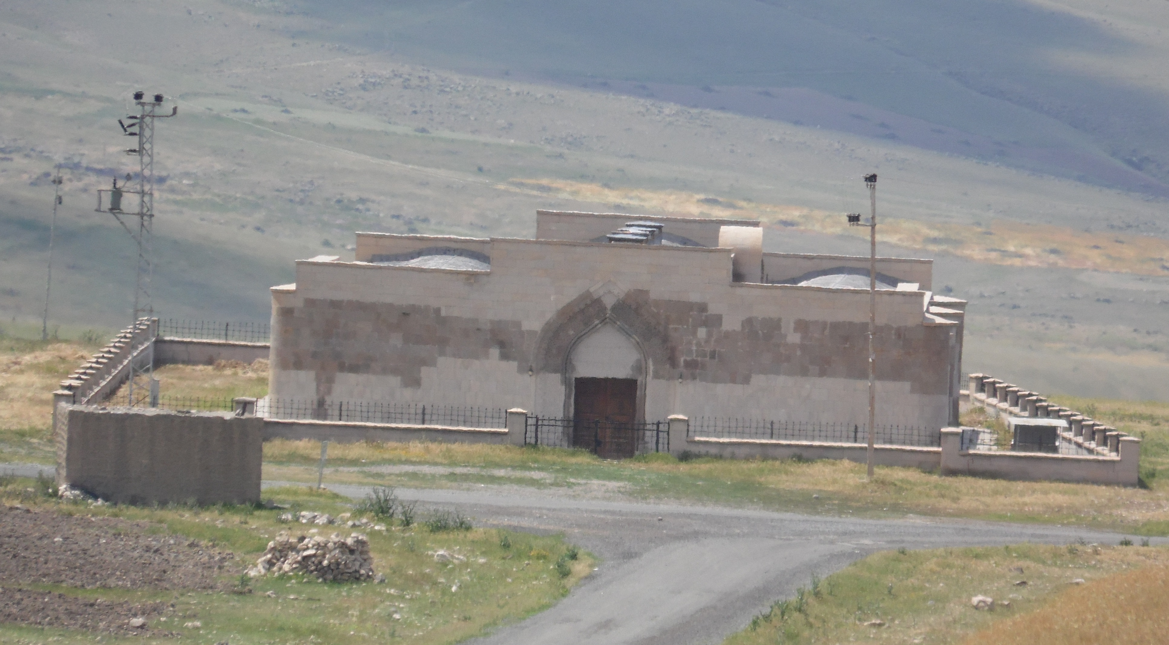 han köyünden kervansaray